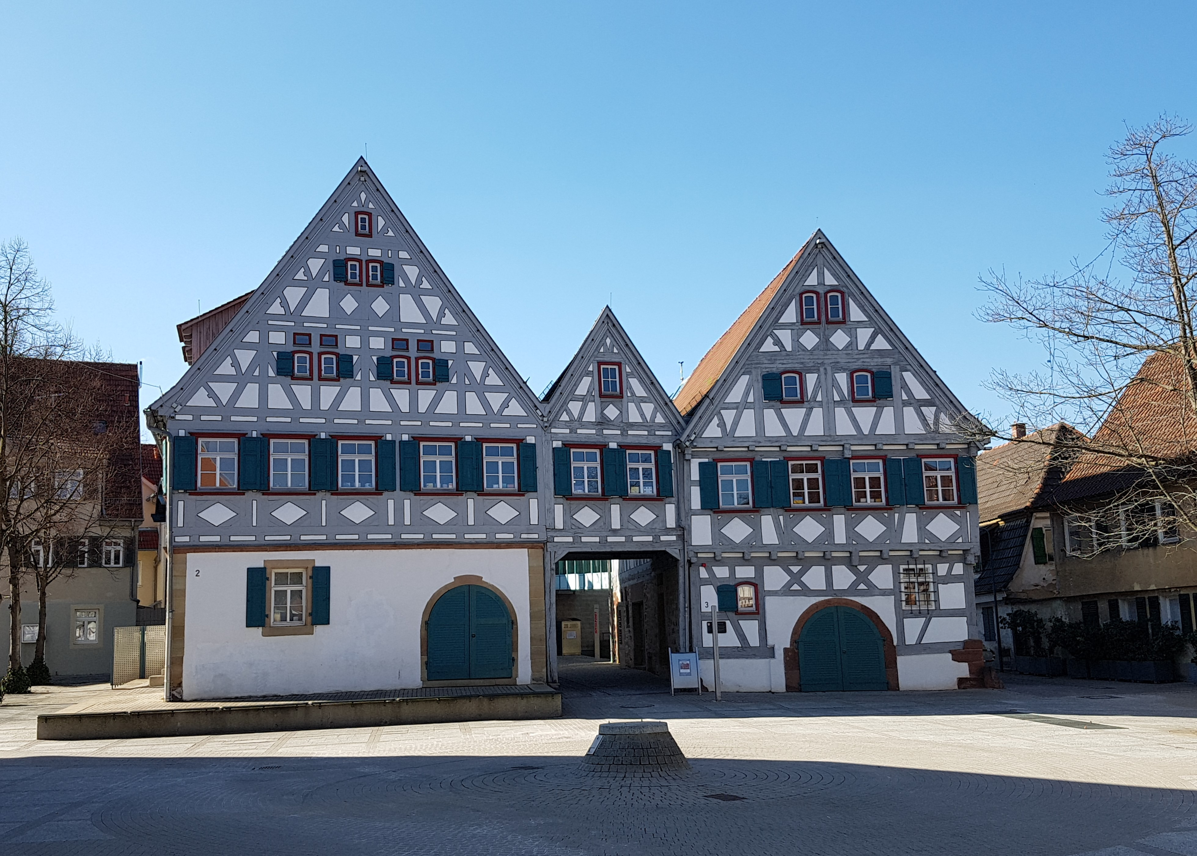 Ditzingen, Dreigiebelhaus